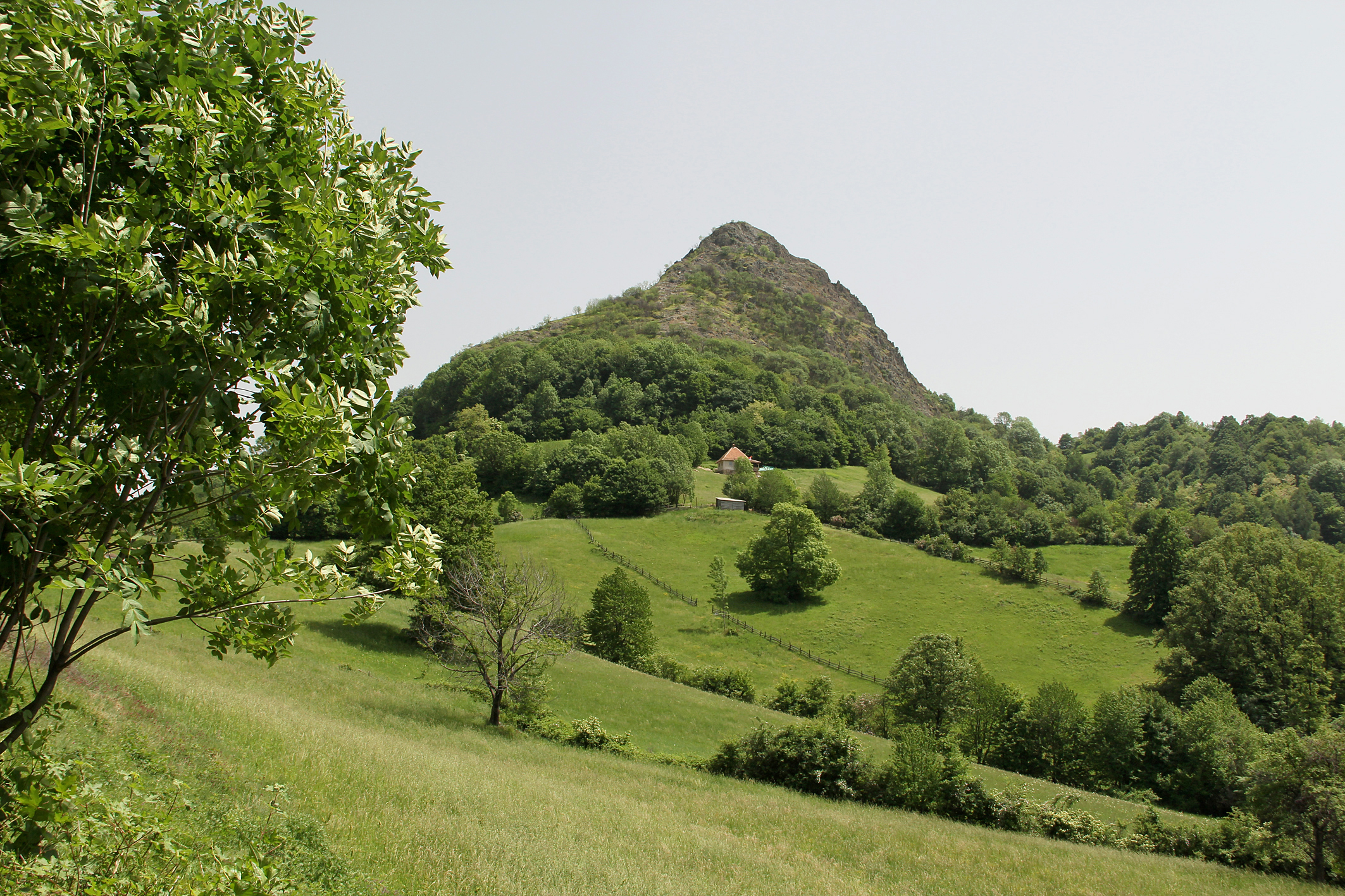 Ово је фотографија заштићеног природног добра у Србији под шифром: СП156 This is a a photo of a natural area in Serbia with ID: СП156 Српски (ћирилица): Природни споменик Островица, Рудник крај Горњег Милановца, Србија